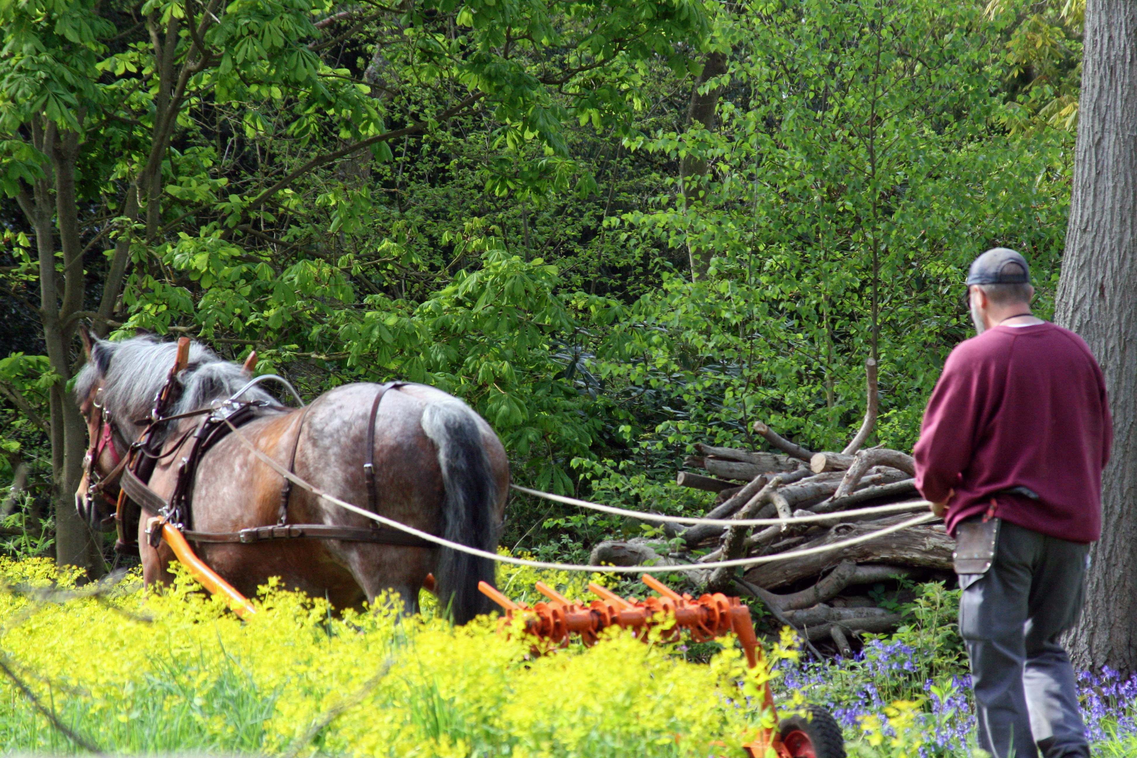 Cheval ardennais au travail dans les champs